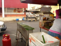 中文（新加坡）: 林添宝摄 麻坡乌达档 2005